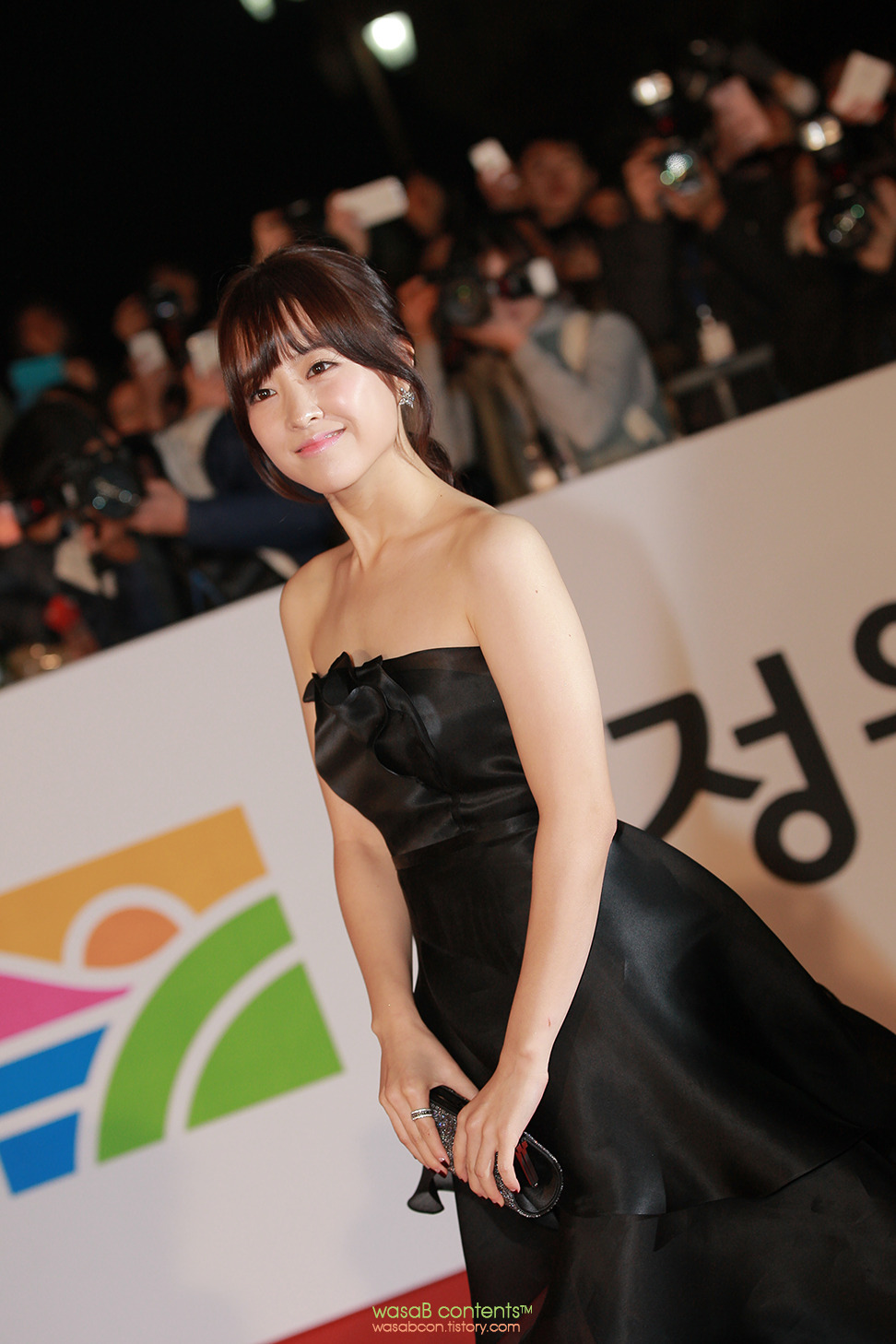 2013 청룡영화제